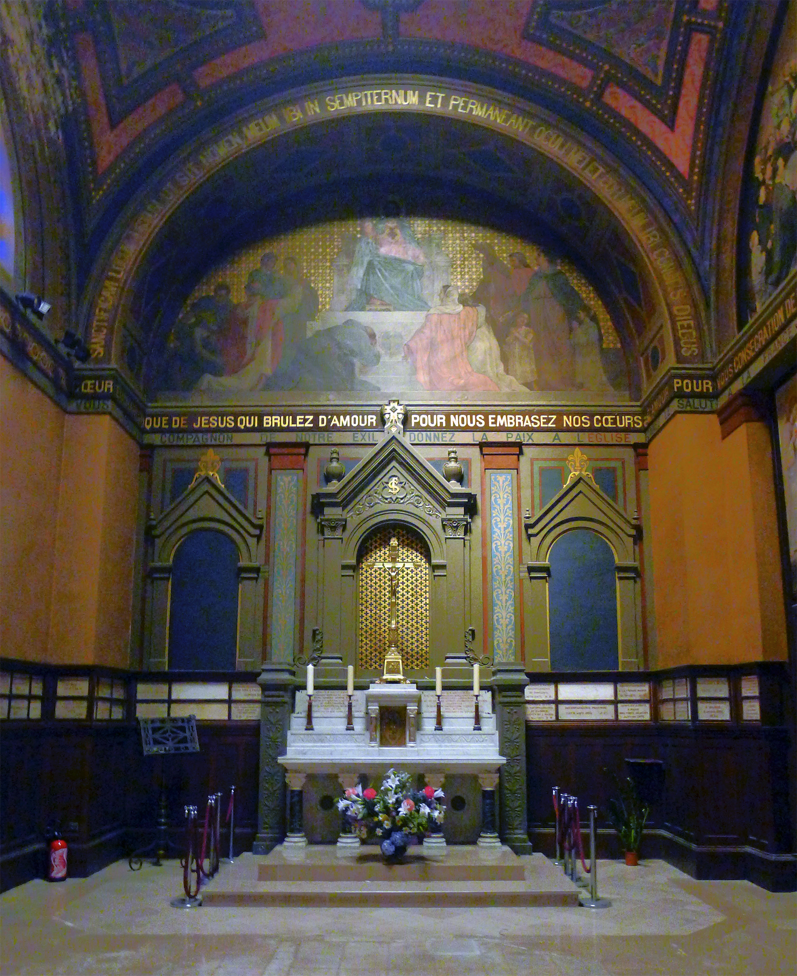 Église Notre-Dame-de-Grâce-de-Passy (chapelle) - Paris XVI